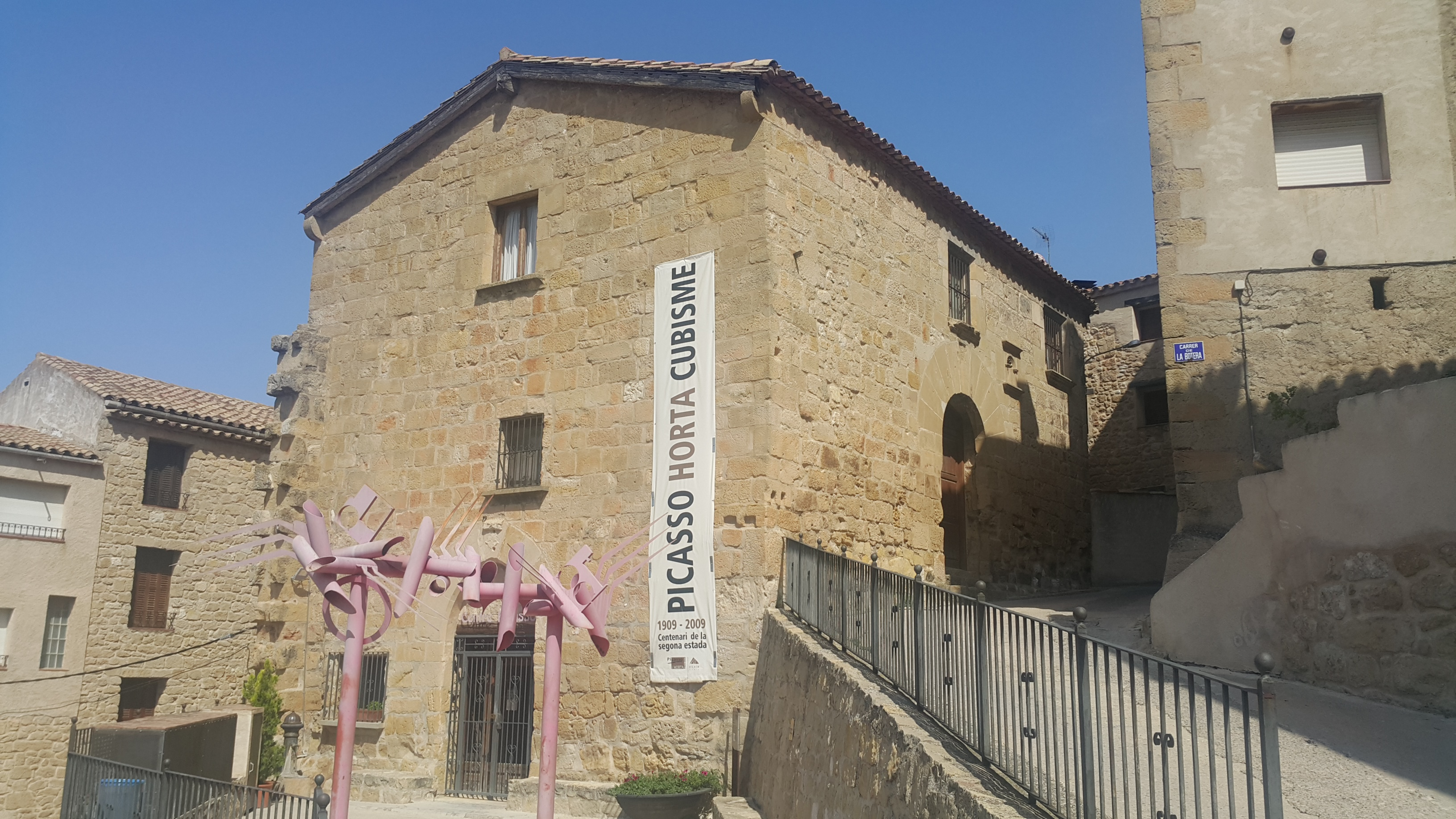 Catalonia Terra Alta Horta de Sant Joan Centre Picasso